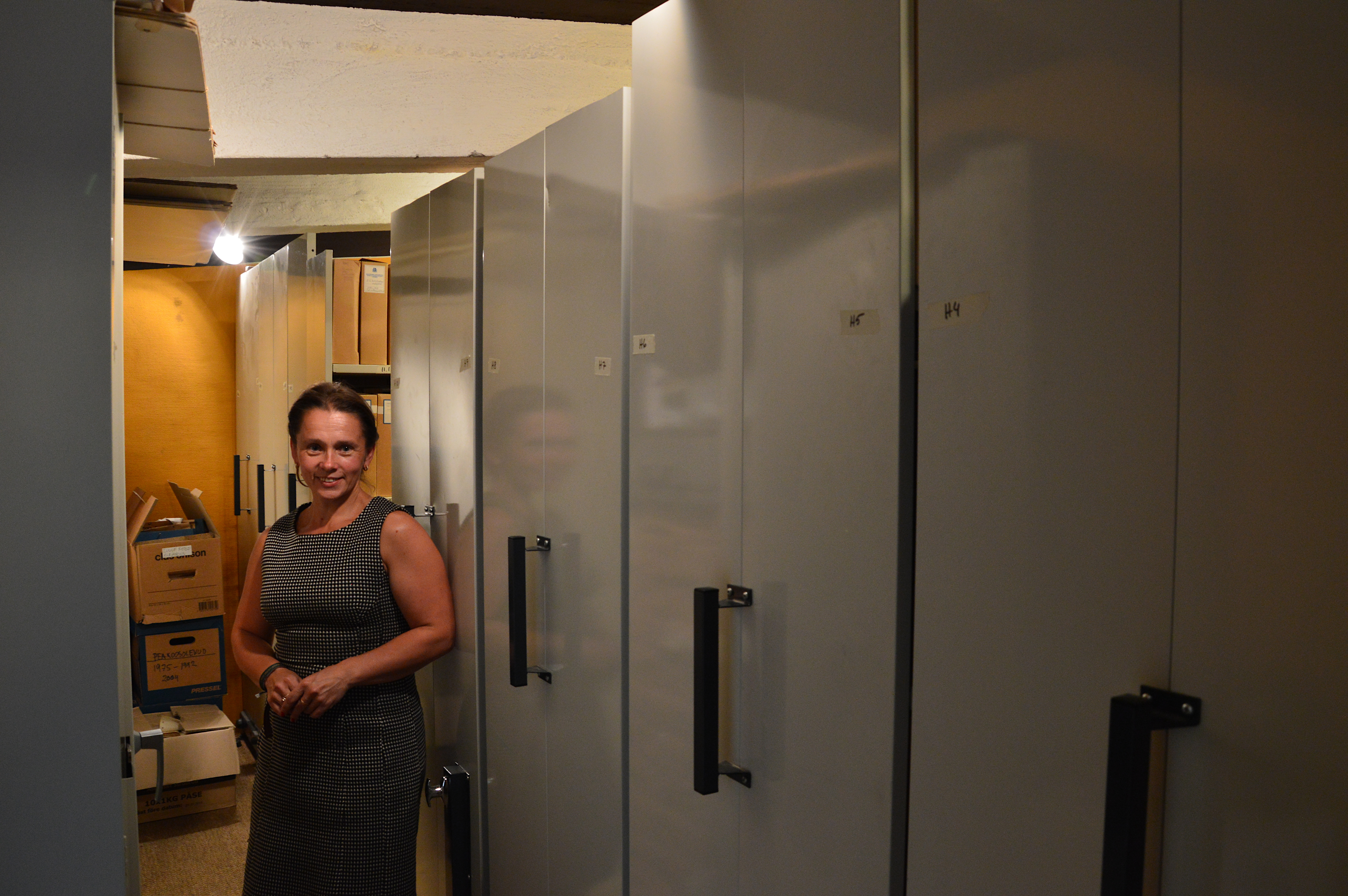 Sirle Sööt Rootsi Eestlaste Arhiivis